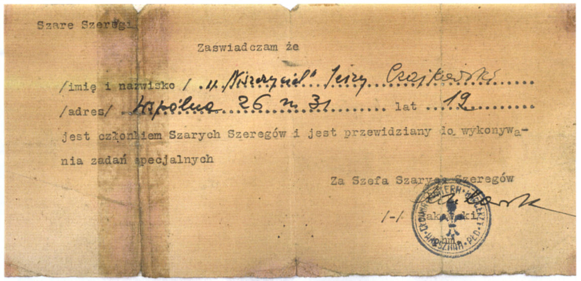 Przepustka z Powstania Warszawskiego (1944) należąca do Jerzego Czajkowskiego ps. "Niszczyciel"